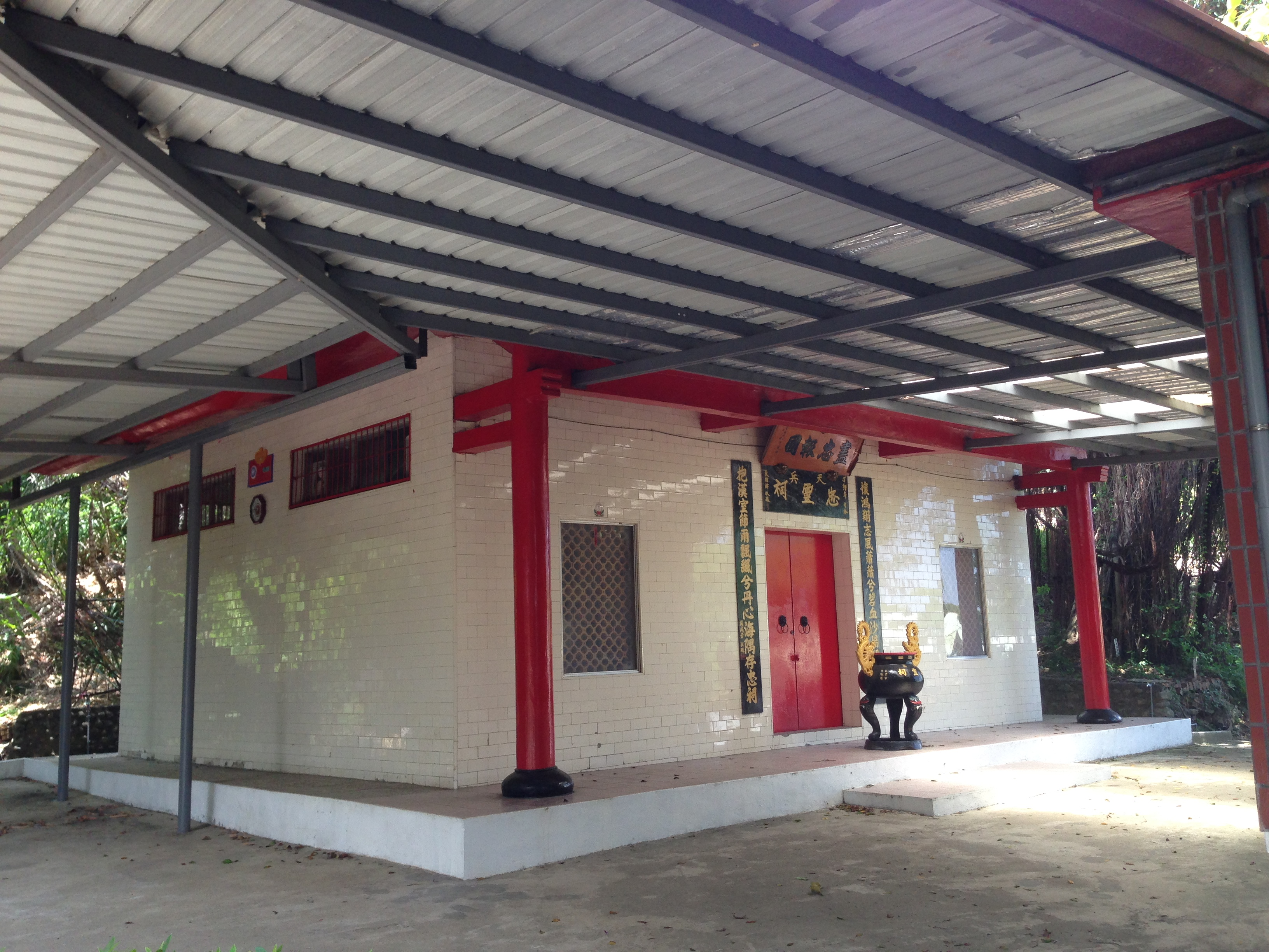 中文（台灣）: 天兵忠靈祠側照